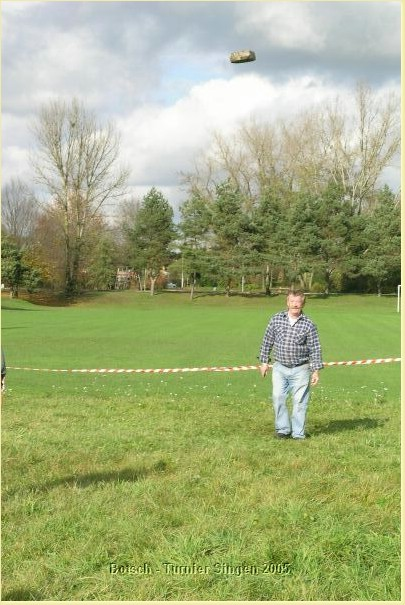 Bootsch-Turnier Singen 2005, Flug des Bootschs